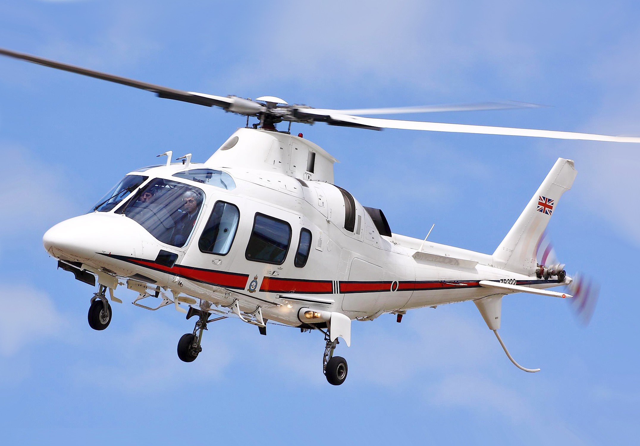 A109 - RIAT 2012